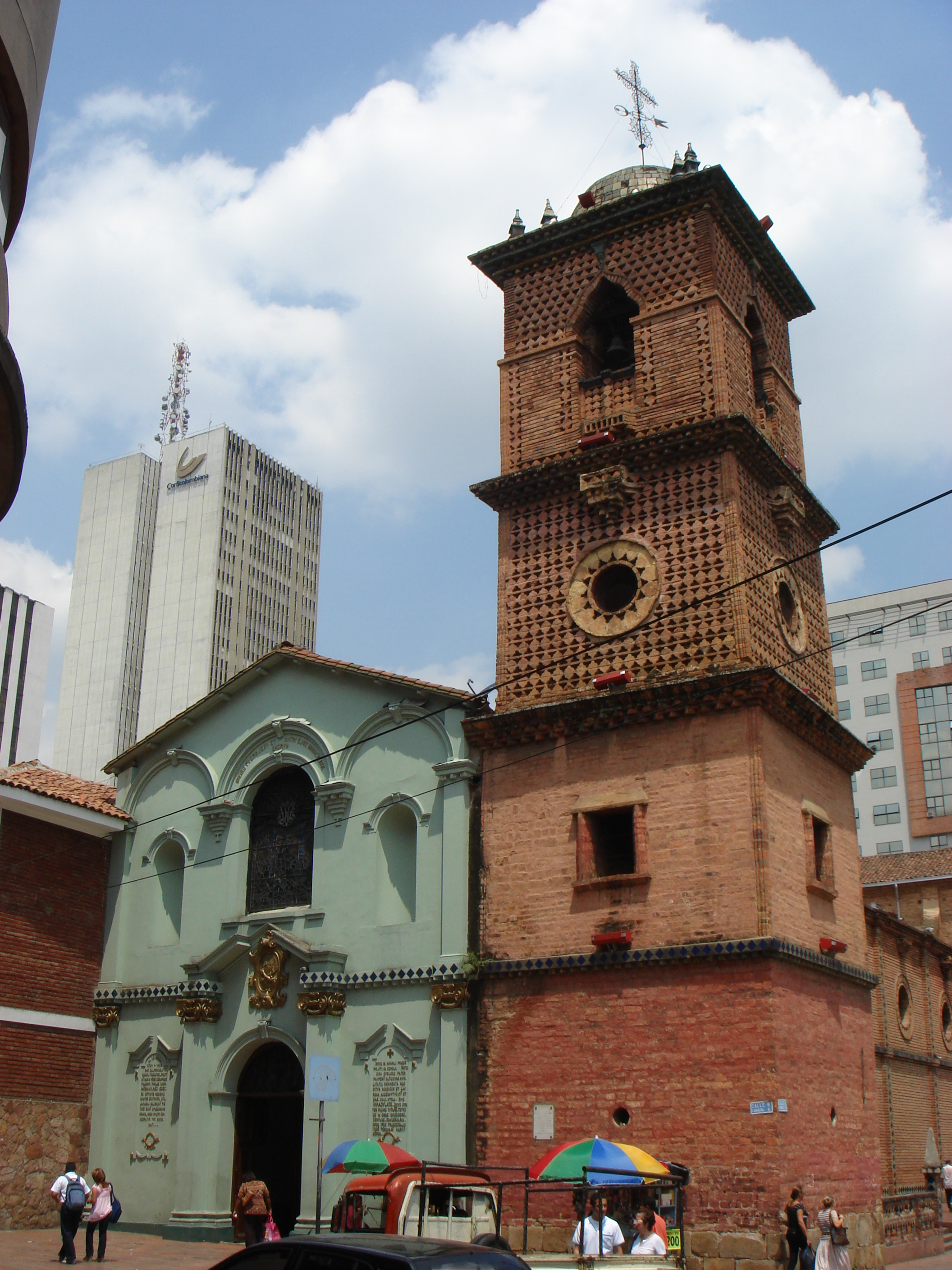 Capilla de la Inmaculada and Torre Mudejar, Cali, Colombia